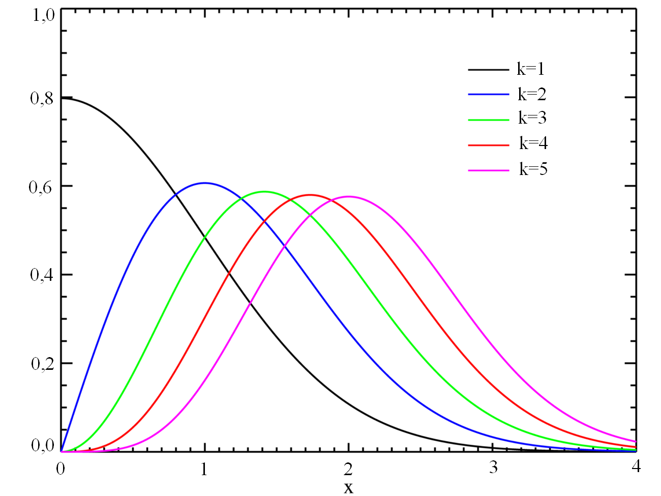 Funkcija gostote verjetnostnosti porazdelitve hi.